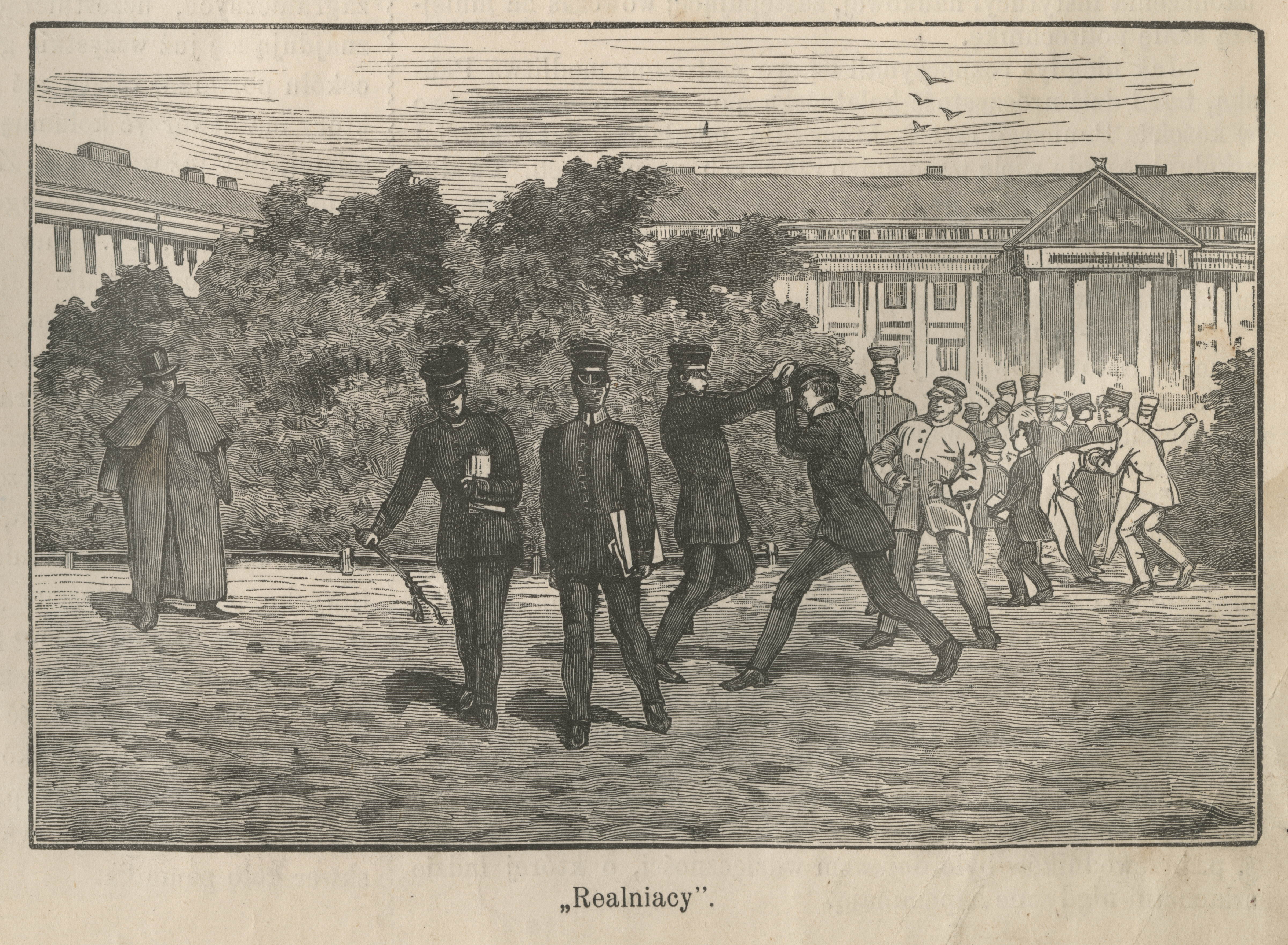 Realniacy